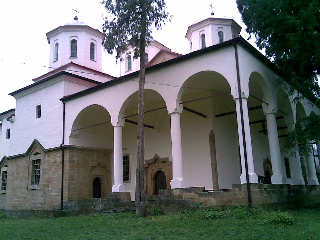 Лопушански манастир Lopushanski Monastery, Bulgaria